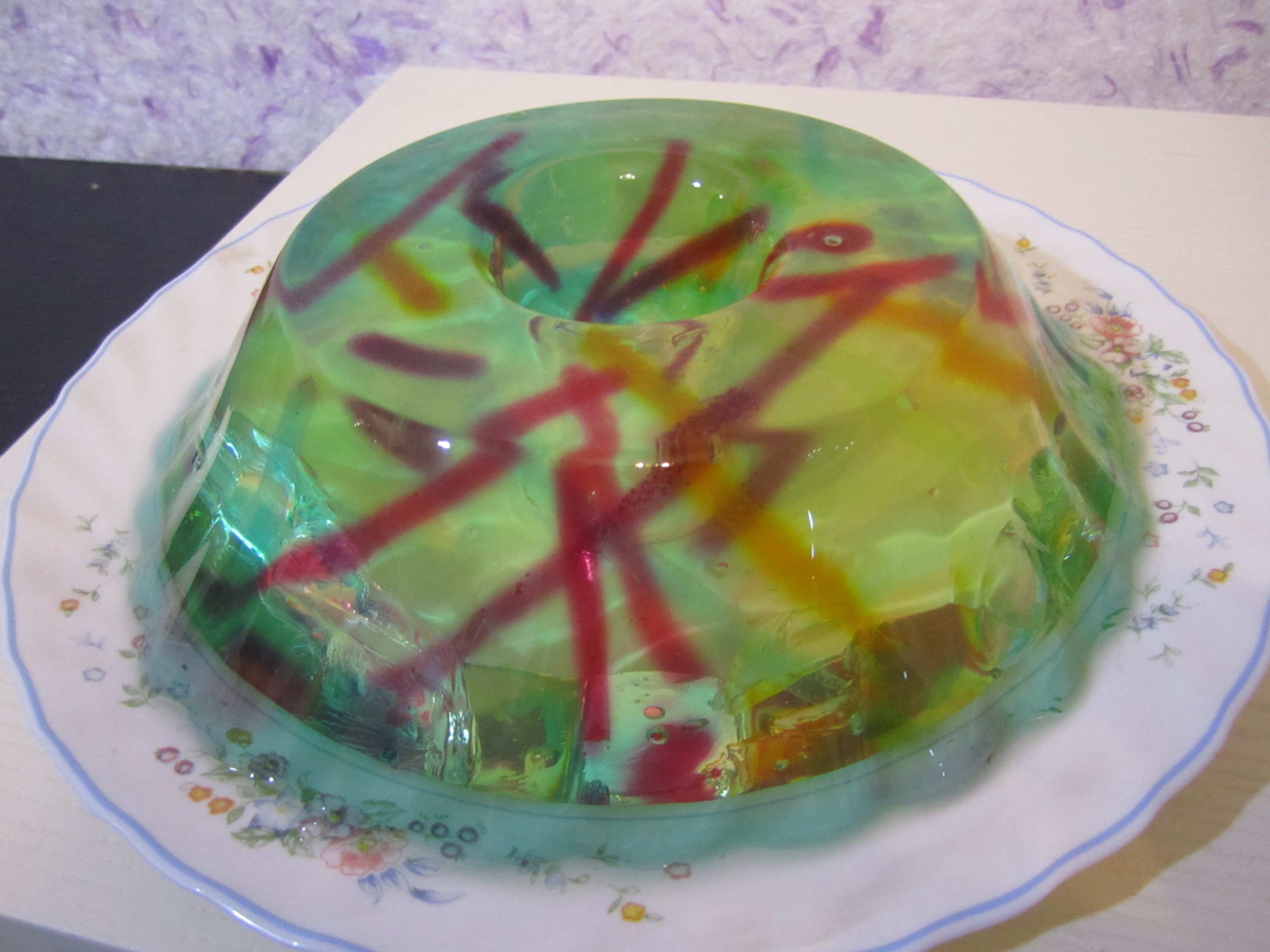 ژله در بشقاب